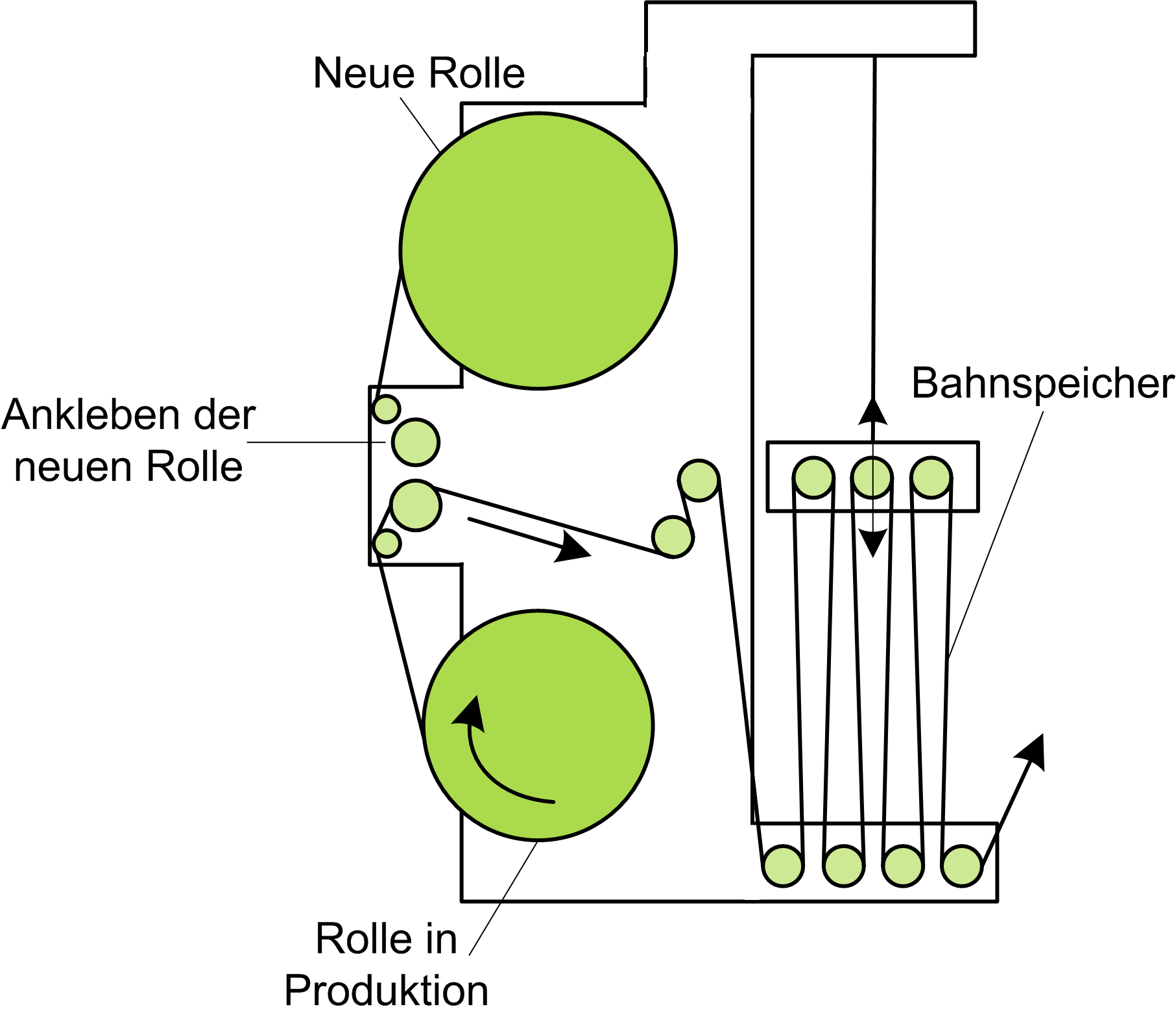 Das Bild zeigt einen Stillstandrollenwechsler mit Papierbahnspeicher einer Rollenoffsetdruckmaschine